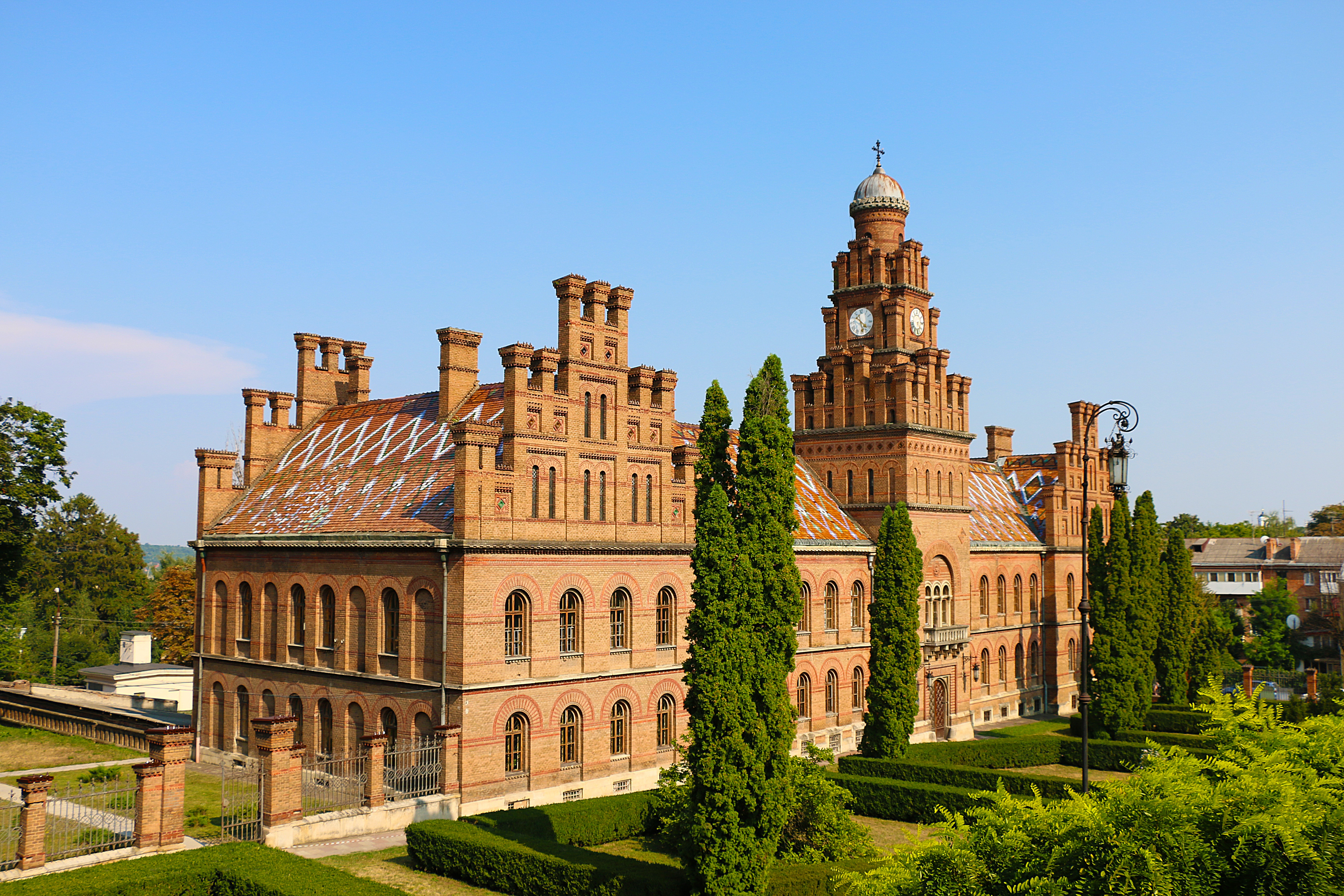 Будинок для приїжджих, Чернівці, вул. М. Коцюбинського, 2